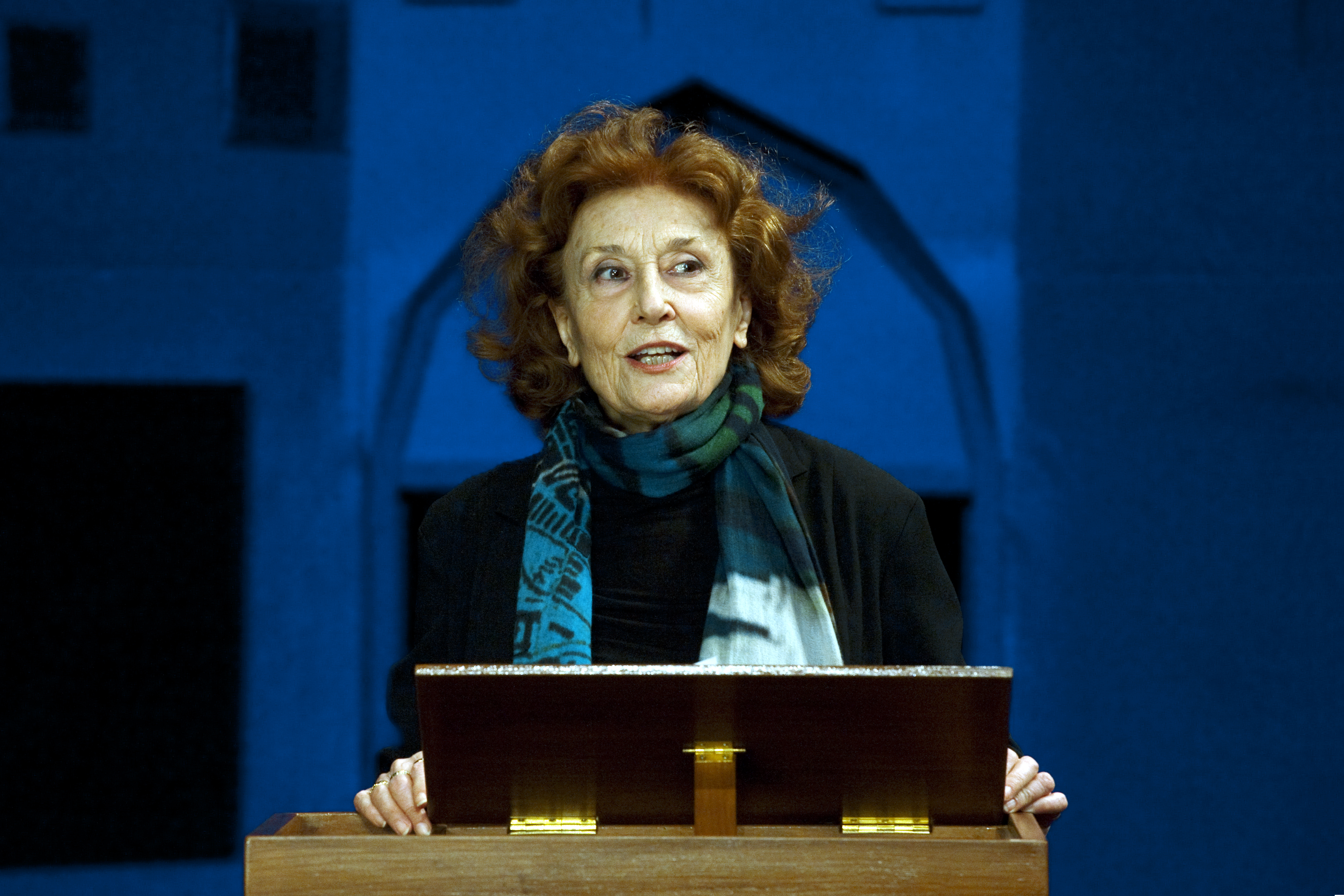 Julia Gutiérrez Caba en el Festival Internacional de Teatro Clásico de Almagro